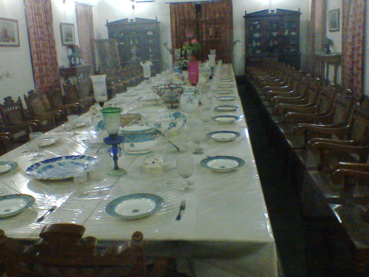 আহসান মঞ্জিল